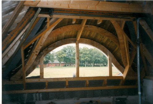 Innenseite mit sichtbarar Konstruktion einer Fledermausgaube